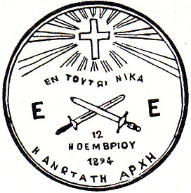 Печат на Етники Етерия